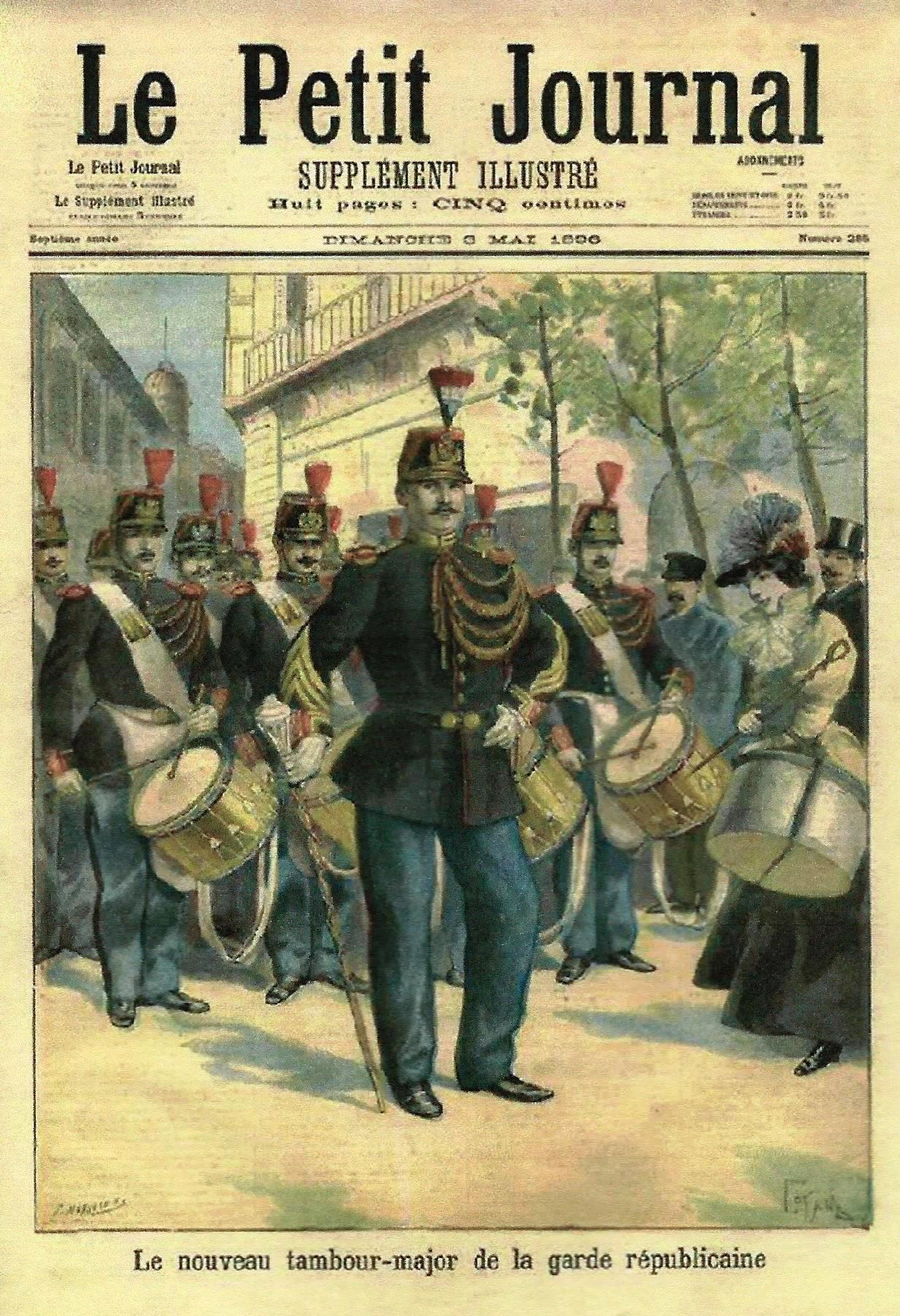 Couverture de revue mai 1900